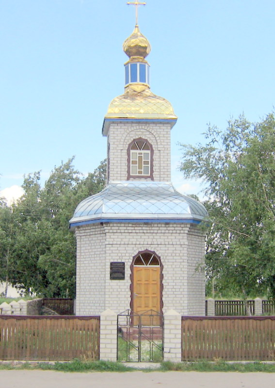 Каплиця в ім'я Святителя Миколая Чудотворця. Сучасна каплиця, зведена у 2000-і за фін. підтримки Б.М. Кузика. Каплиця в ім'я Святителя Миколая Чудотворця в с. Головківка Чигирин. р-ну Черкас. обл.